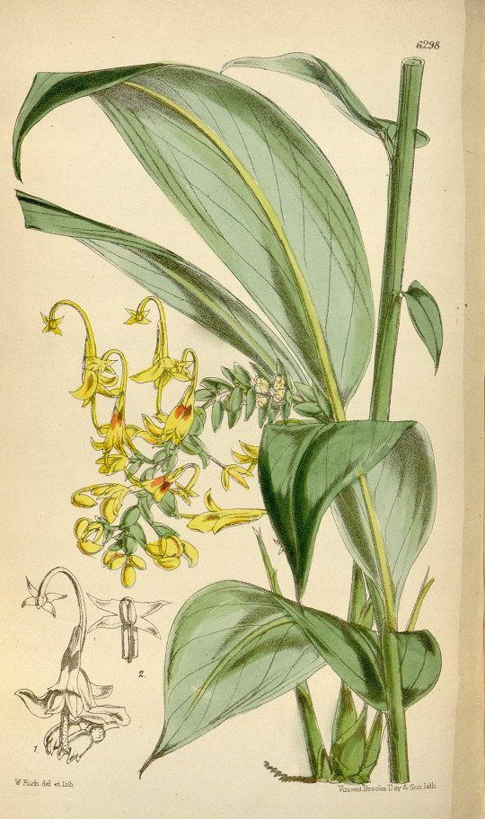 Globba schomburgkii Hook.f. Planche 6298 du Curtis's Botanical Magazine Vol 103 année 1877